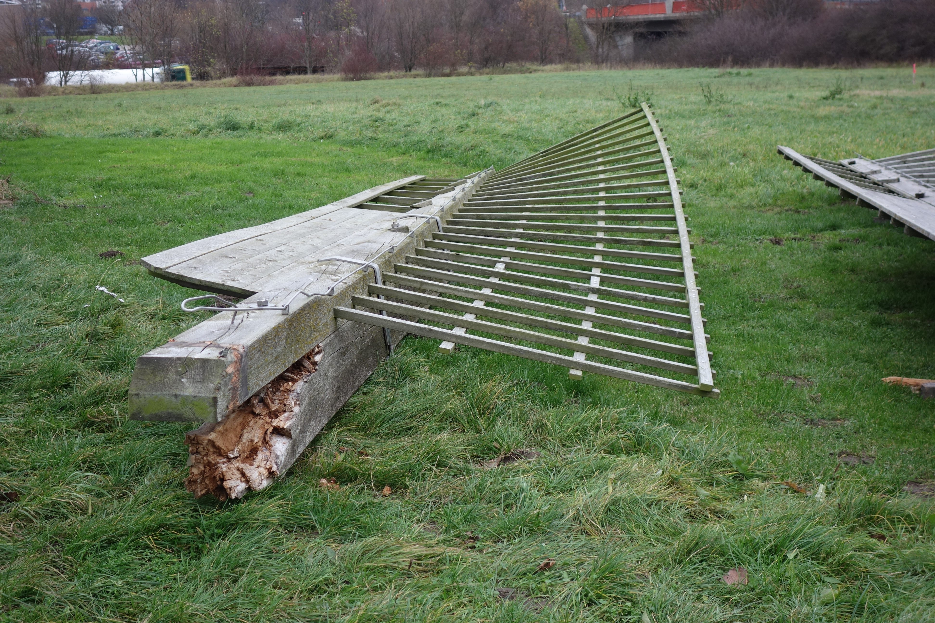 Bockwindmühle bei Salzgitter-Lichtenberg - Durch Orkan im Herbst 2015 gebrochener Flügel